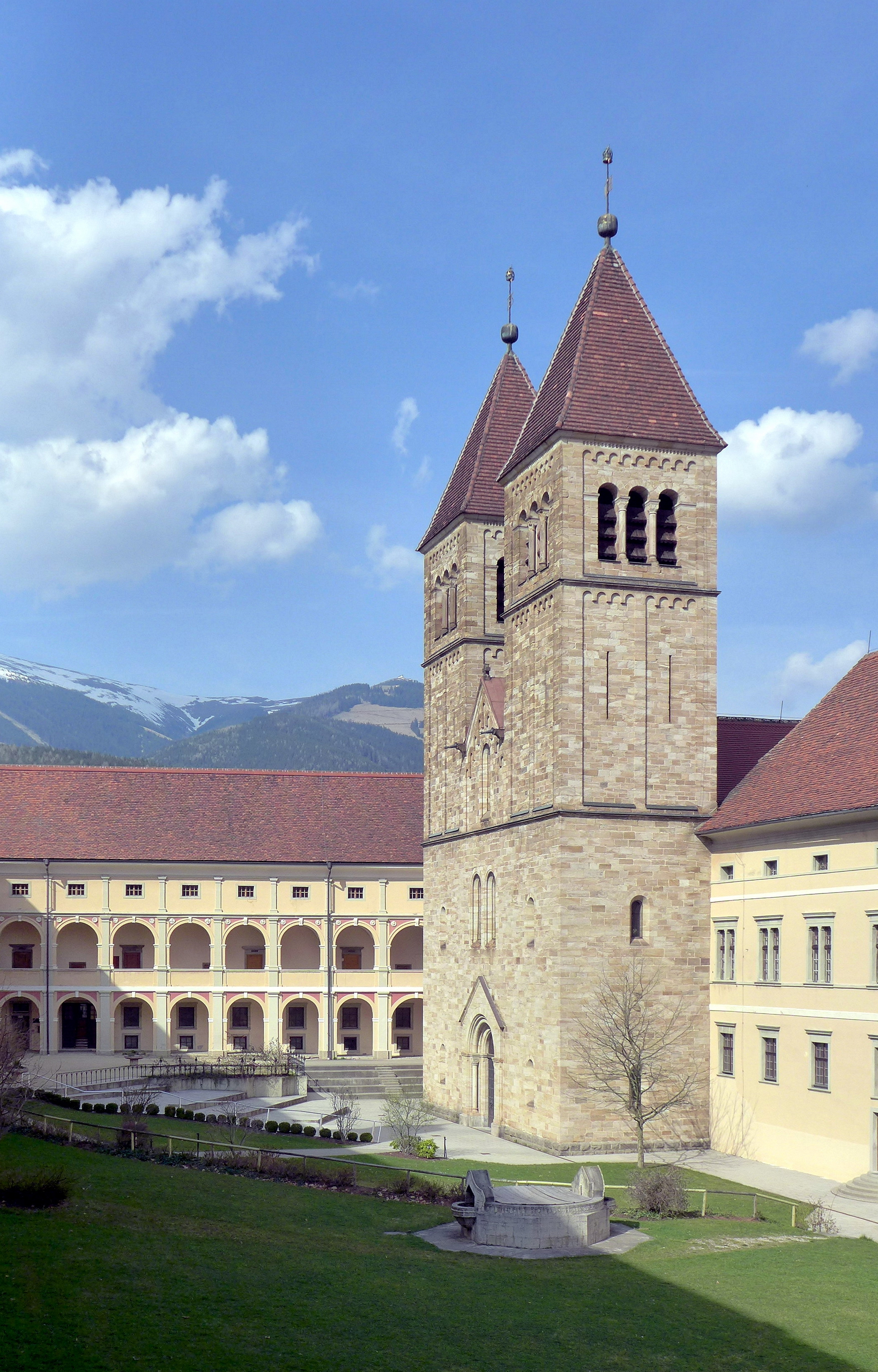 Benediktinerabtei Seckau, Äußerer Klosterhof und Türme der Basilika